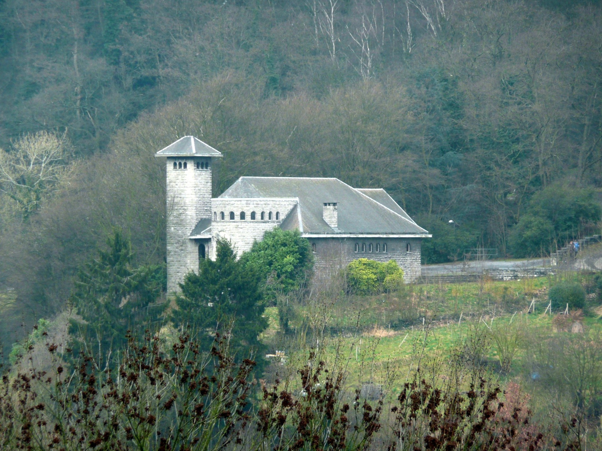 1Chapelle Saint-Maurice (mémorial Walthère Dewé). Rue Coupée 94, Liège, Belgium